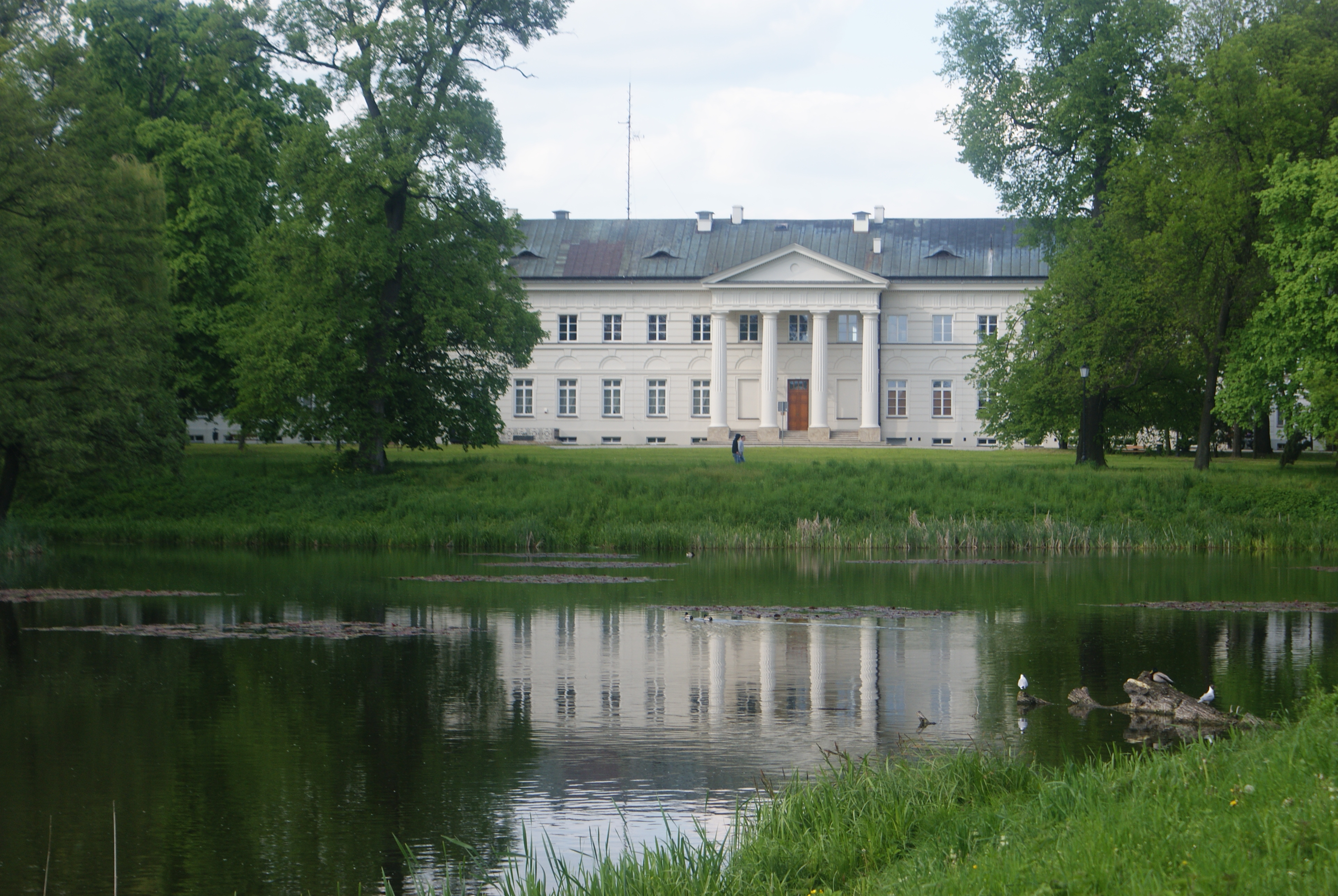 Dęblin, zespół pałacowy, XVIII